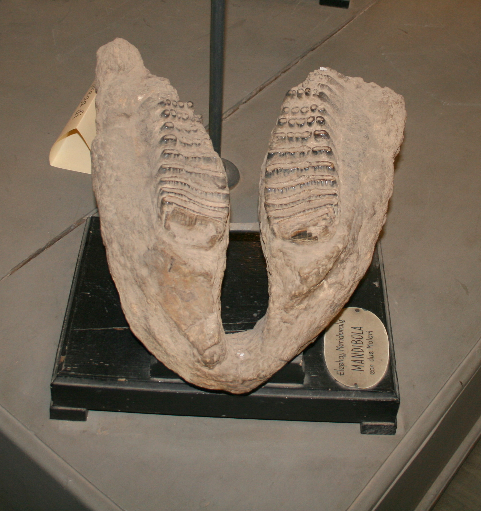 Museo Paleontologico di Montevarchi - Mammuthus meridionalis